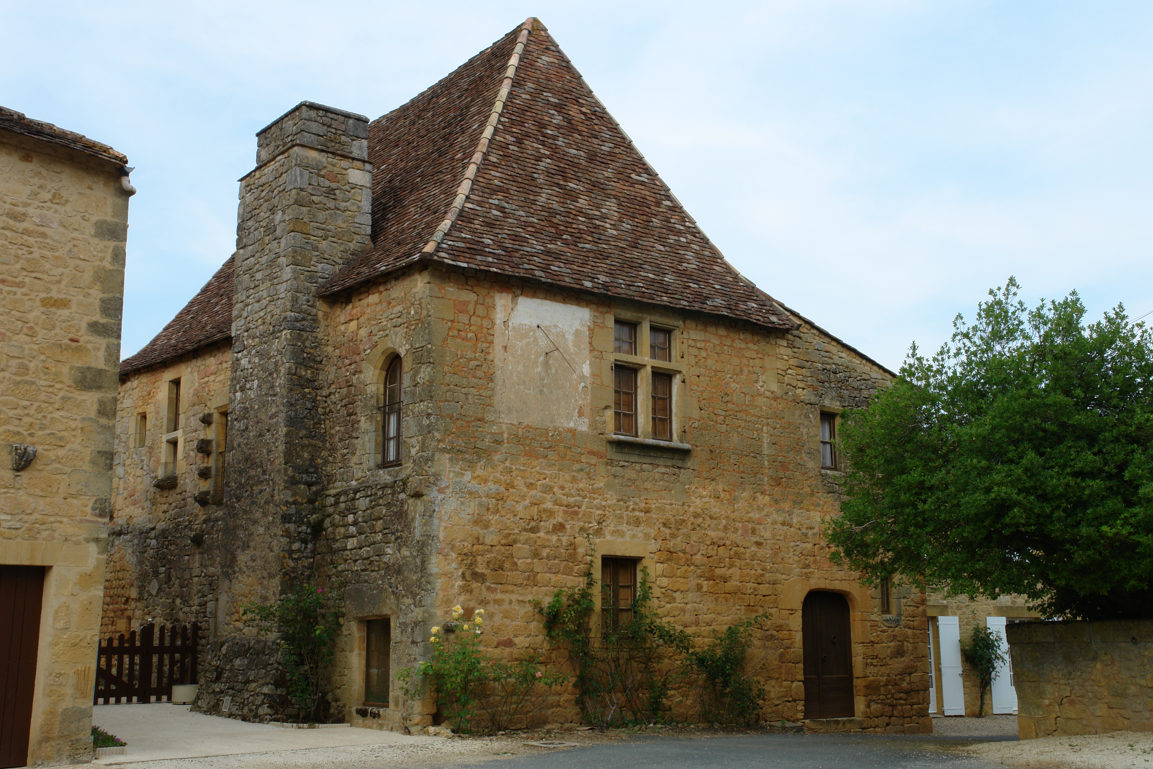 Maison avec un cadran solaire.